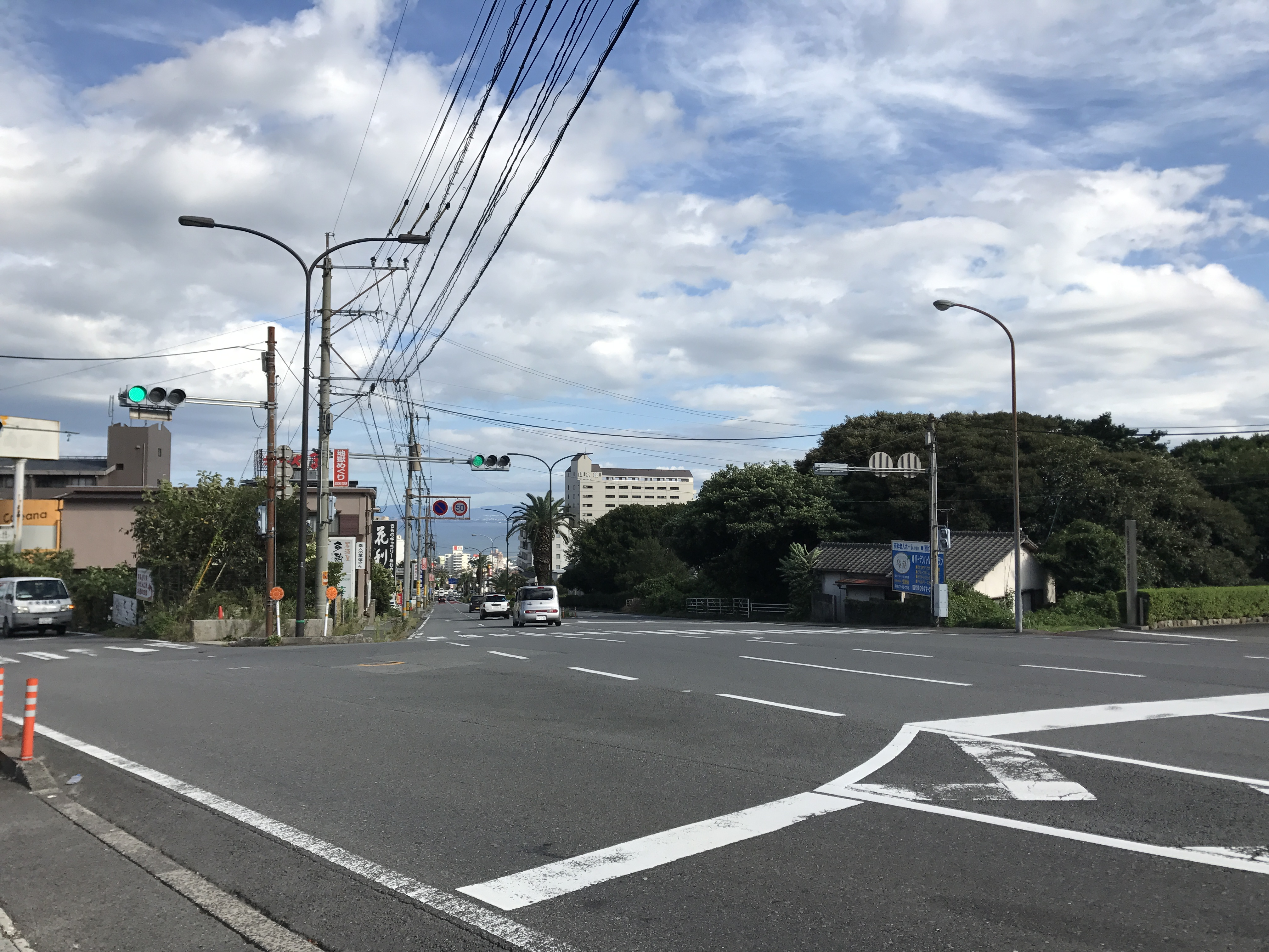 山地獄前の国道500号